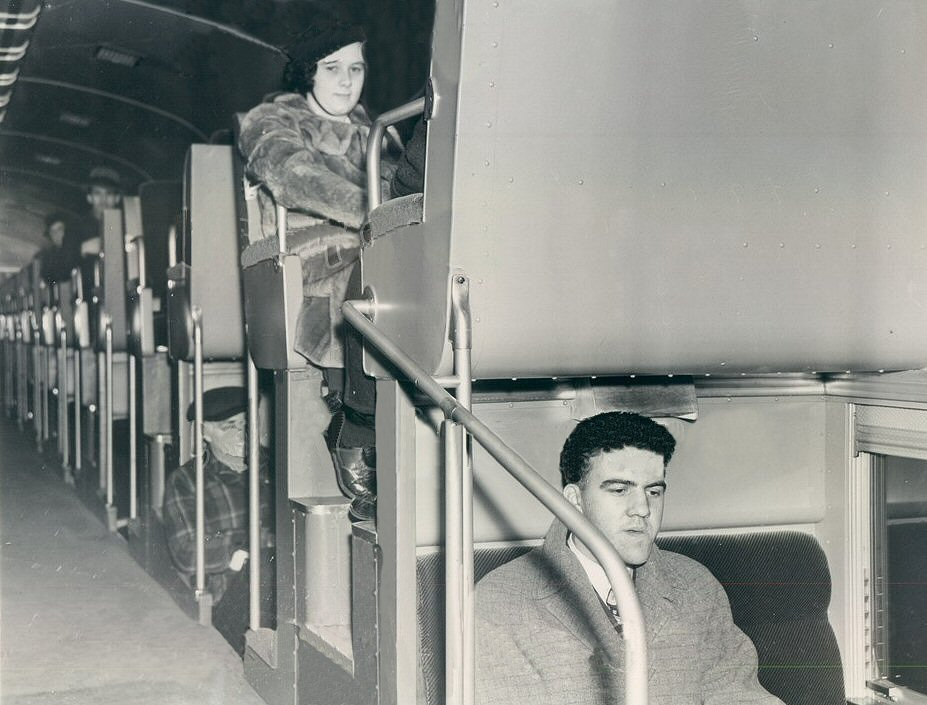 Long Island Rail Road treni a due piani